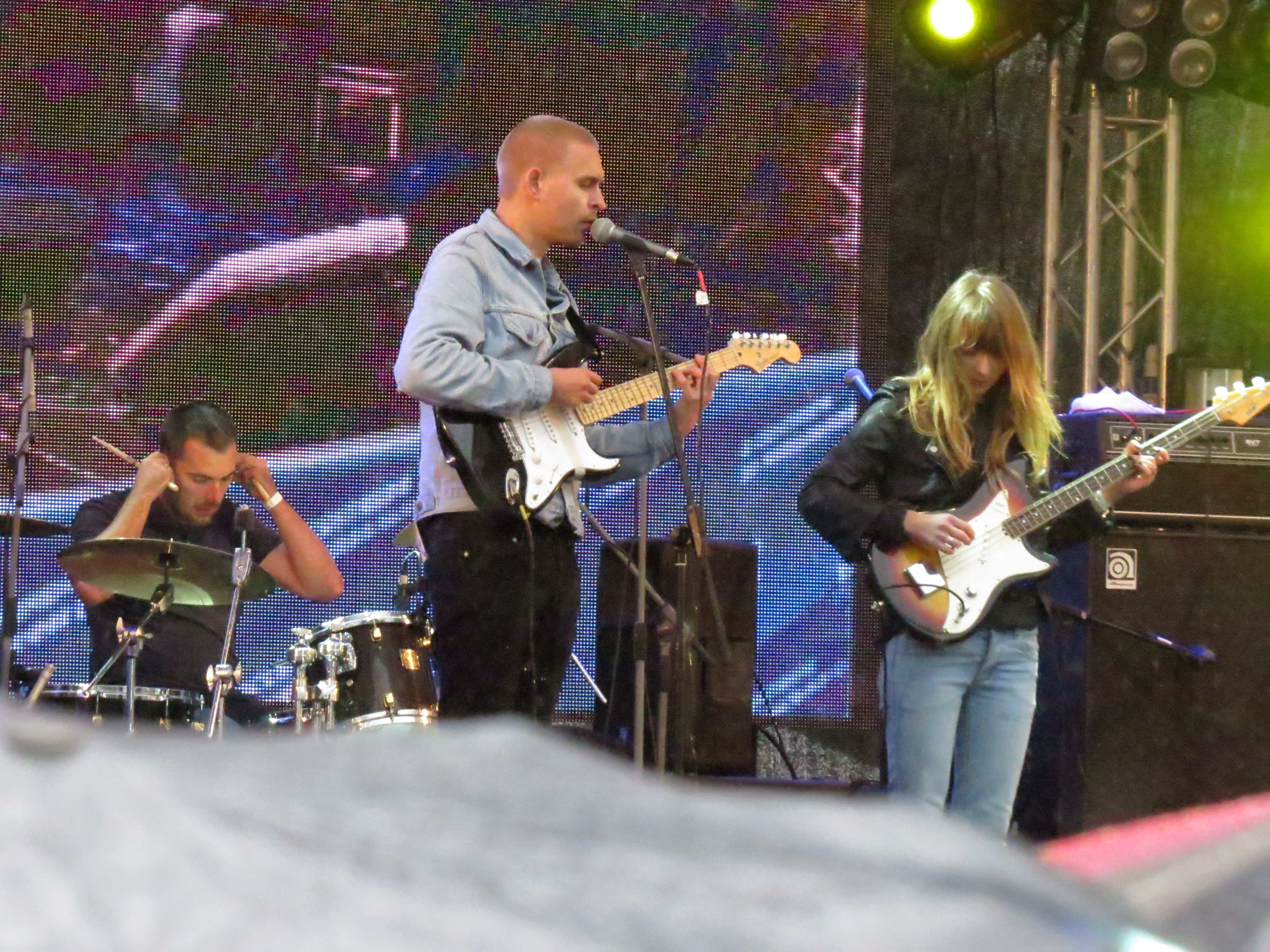 Группа Motorama на концерте-митинге в поддержку кандидата в мэры Москвы Алексея Навального на проспекте Сахарова 6 сентября 2013 года